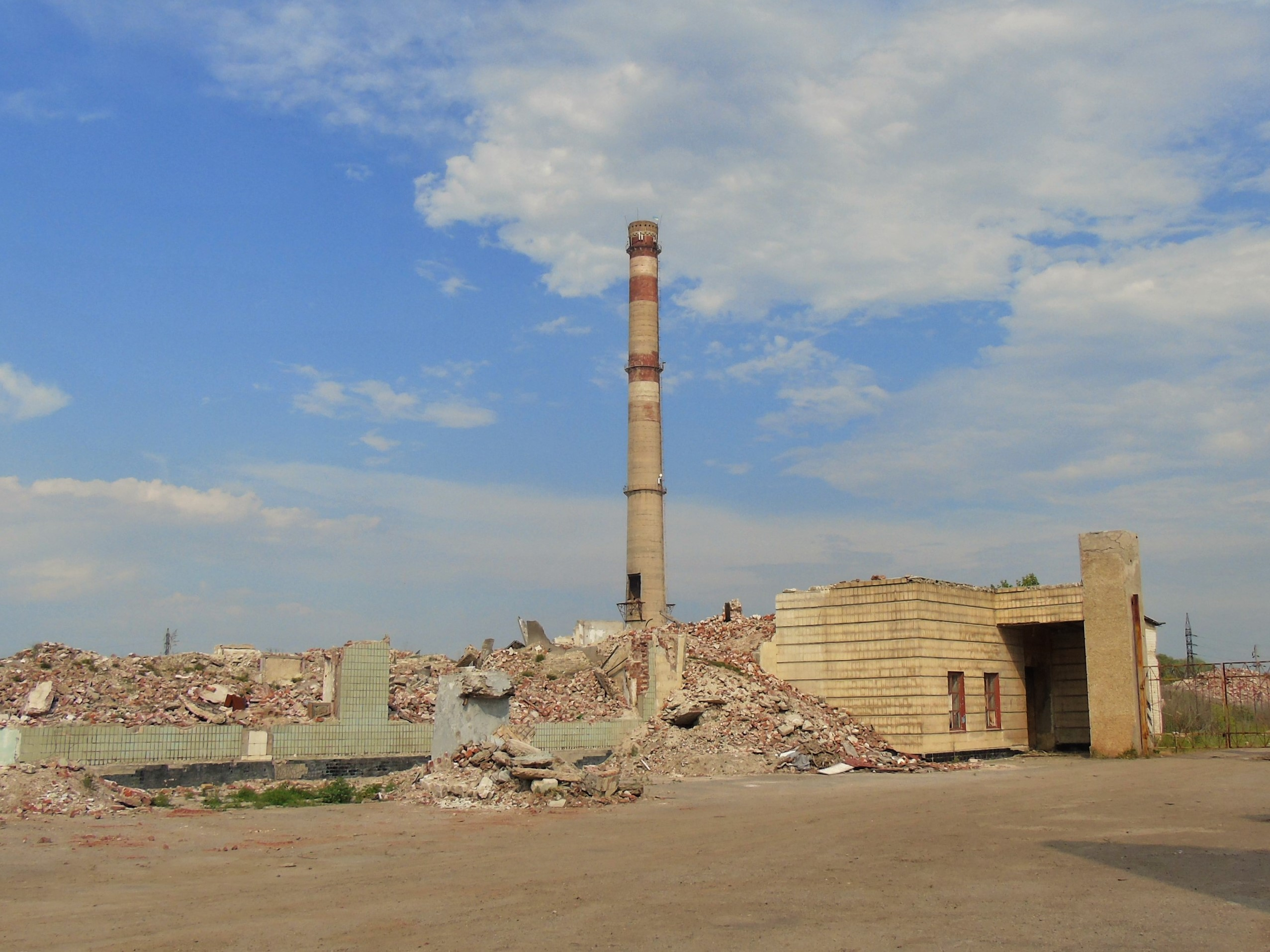 Всі будівлі содового заводу розібрані, залишається лише одна труба, на якій знаходяться ретранслятори мобільного зв'язку. (стан на червень 2017р)